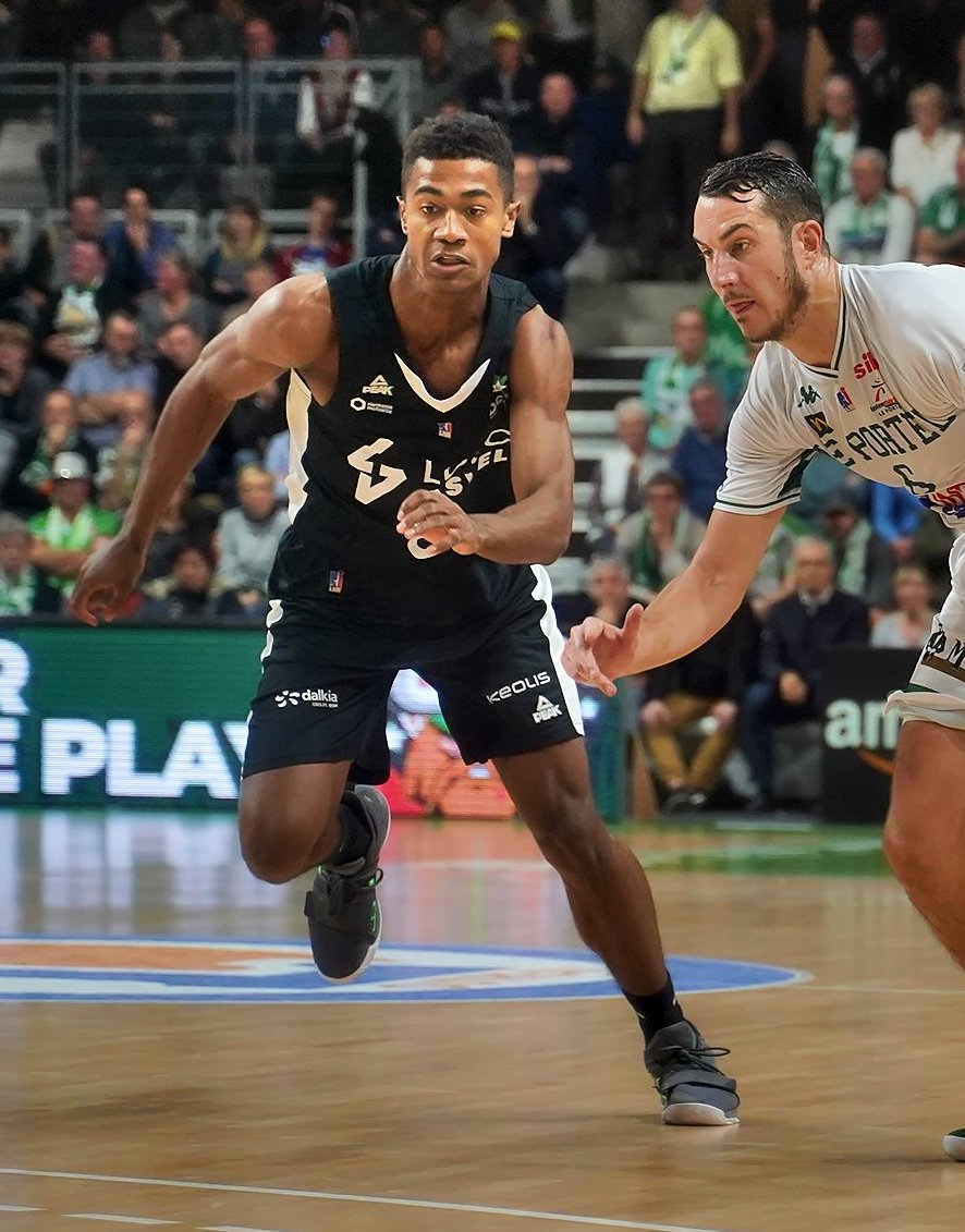 ODN07596